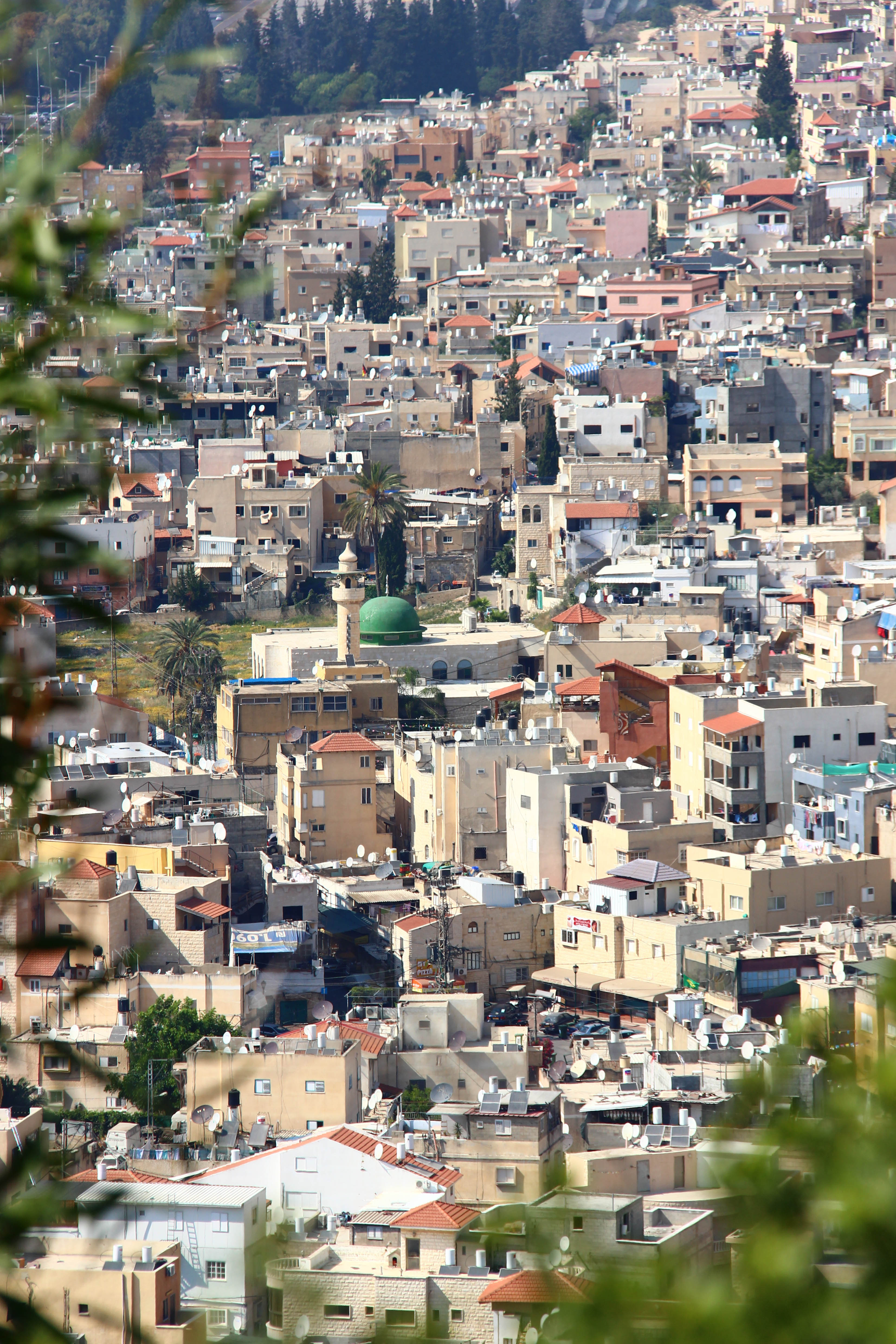 قرية الفراديس - فلسطين48